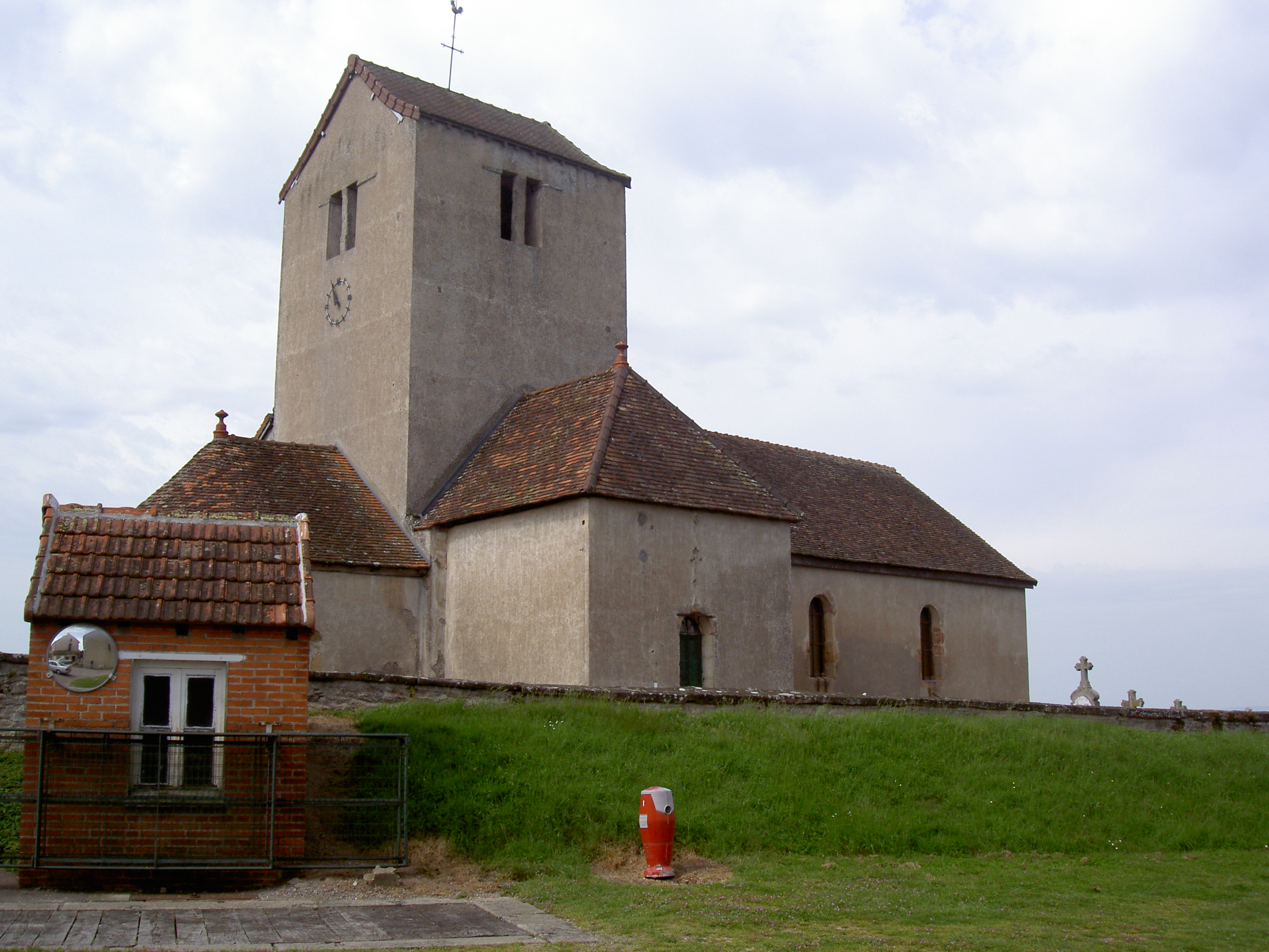 Eglise de Morey.jpg